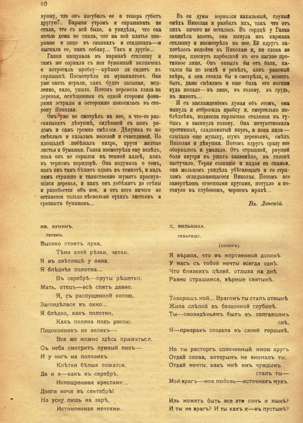 Стихи Л. Н. Вилькиной в журнале "Народная весть", 1906, ноябрь